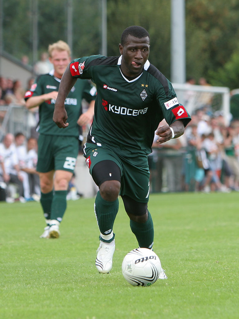 Soumaila Coulibaly beim Saisonvorbereitungstest gegen den FC Wegberg-Beeck